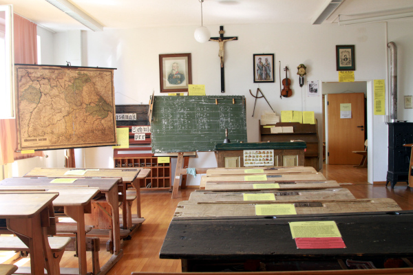 Große Schulstube im Schulmuseum AhrainDepicted place: Schulmuseum Ahrain